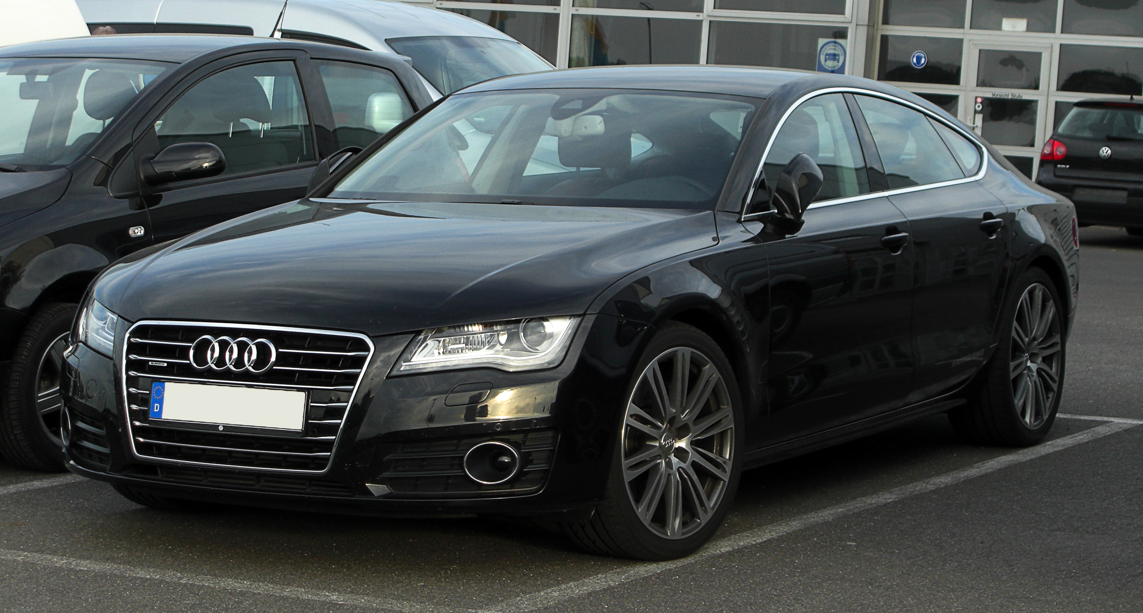 Audi A7 Sportback 3.0 TDI quattro